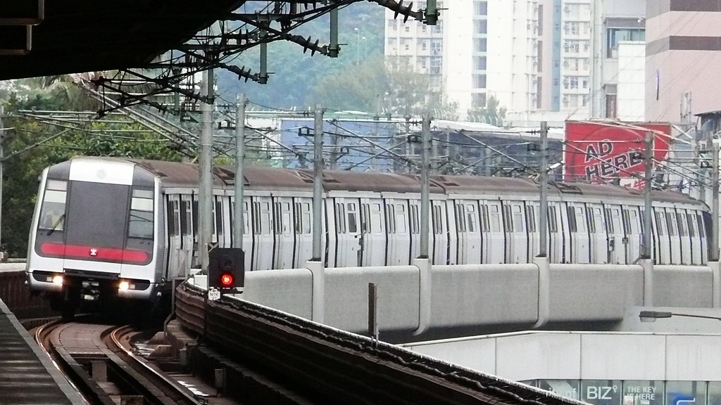 Hong Kong MTR trains